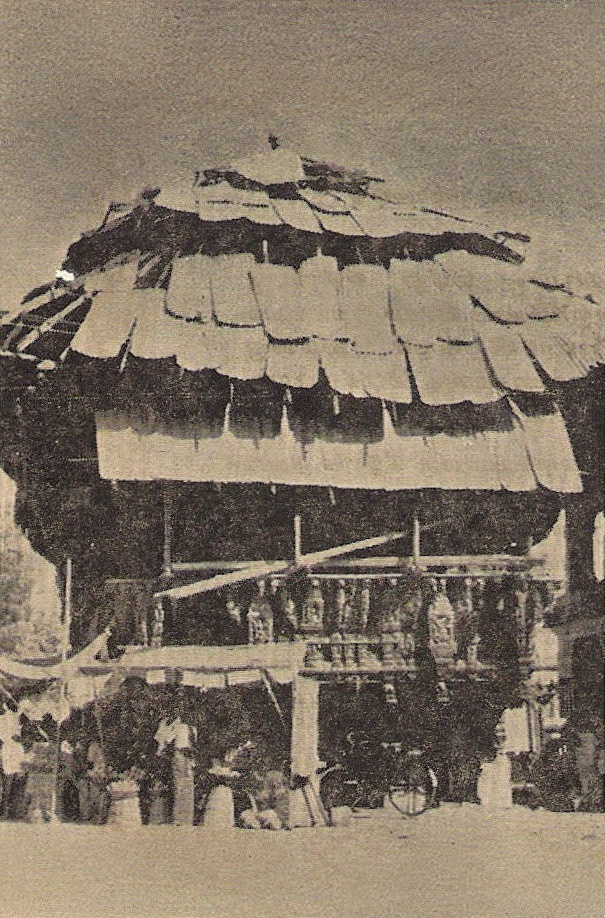 srivilliputtur andal temple car in 1940.